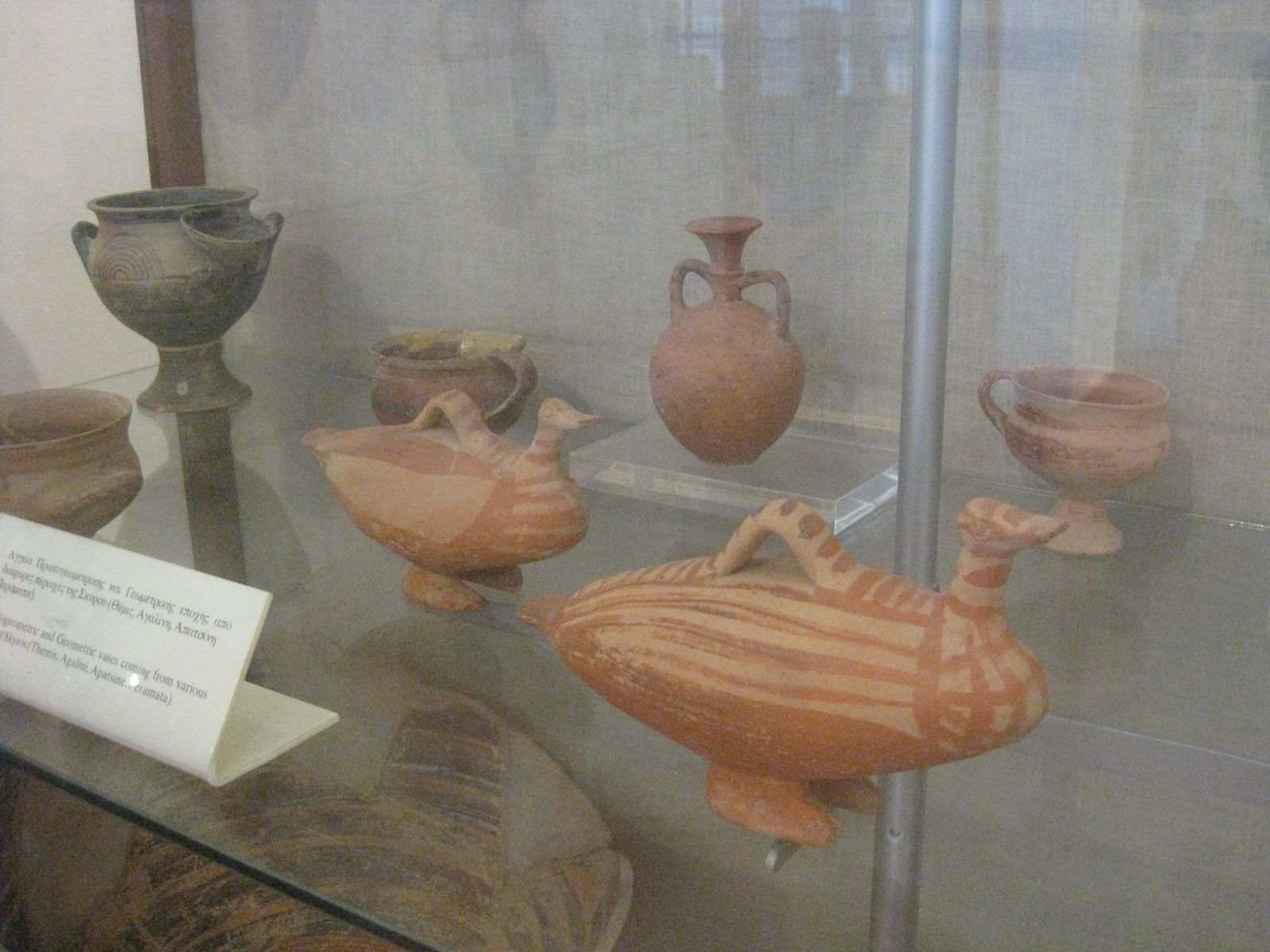 Une vitrine du musée archéologique de Skyros.